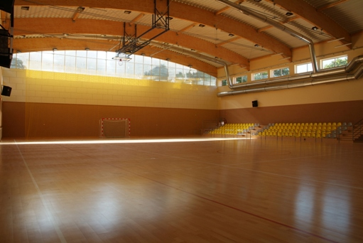 TS Ostrovia Ostrów Wielkopolski - hala sportowa.